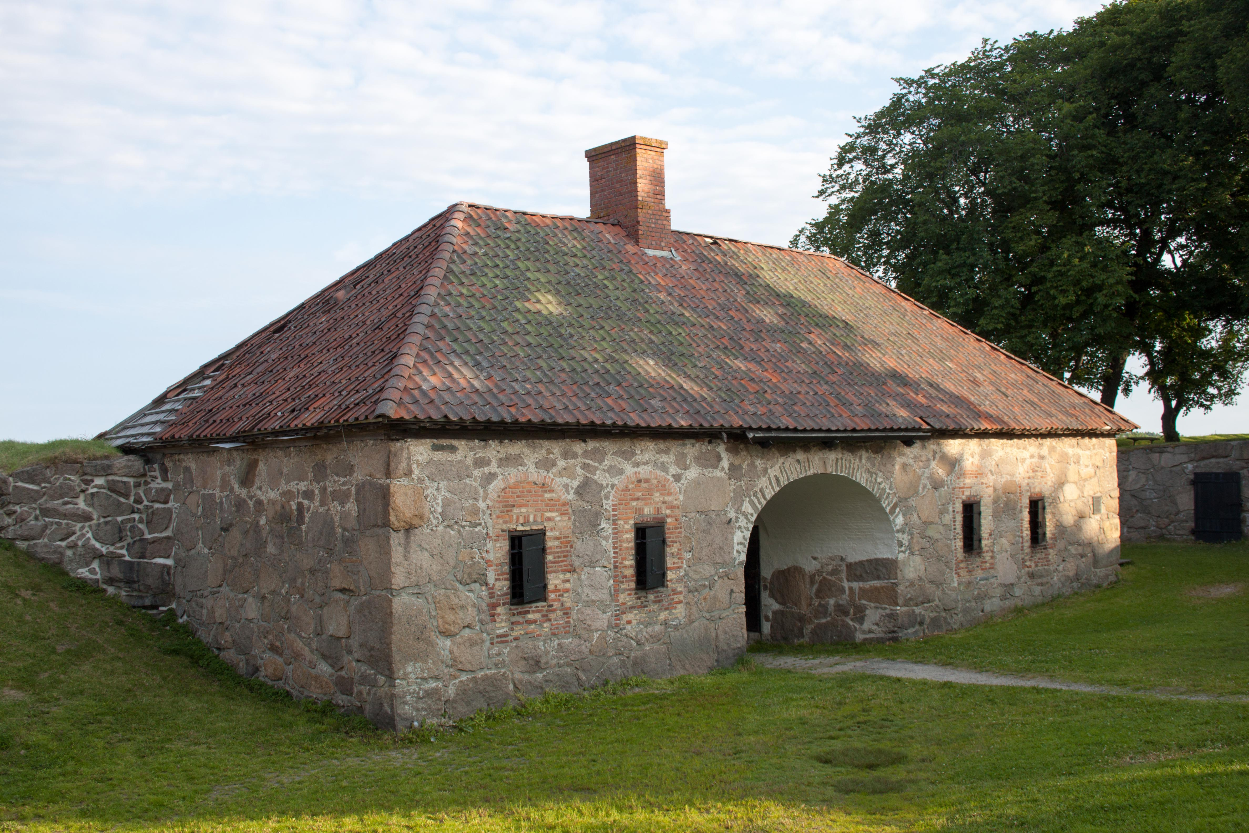 Kongsten Fort